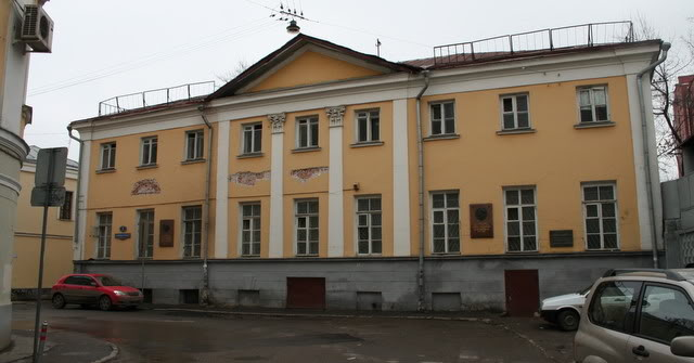 Дом Веневитинова — дом в Москве, в Кривоколенном переулке. Принадлежал семье Веневитиновых. Объект культурного наследия Федерального значения.